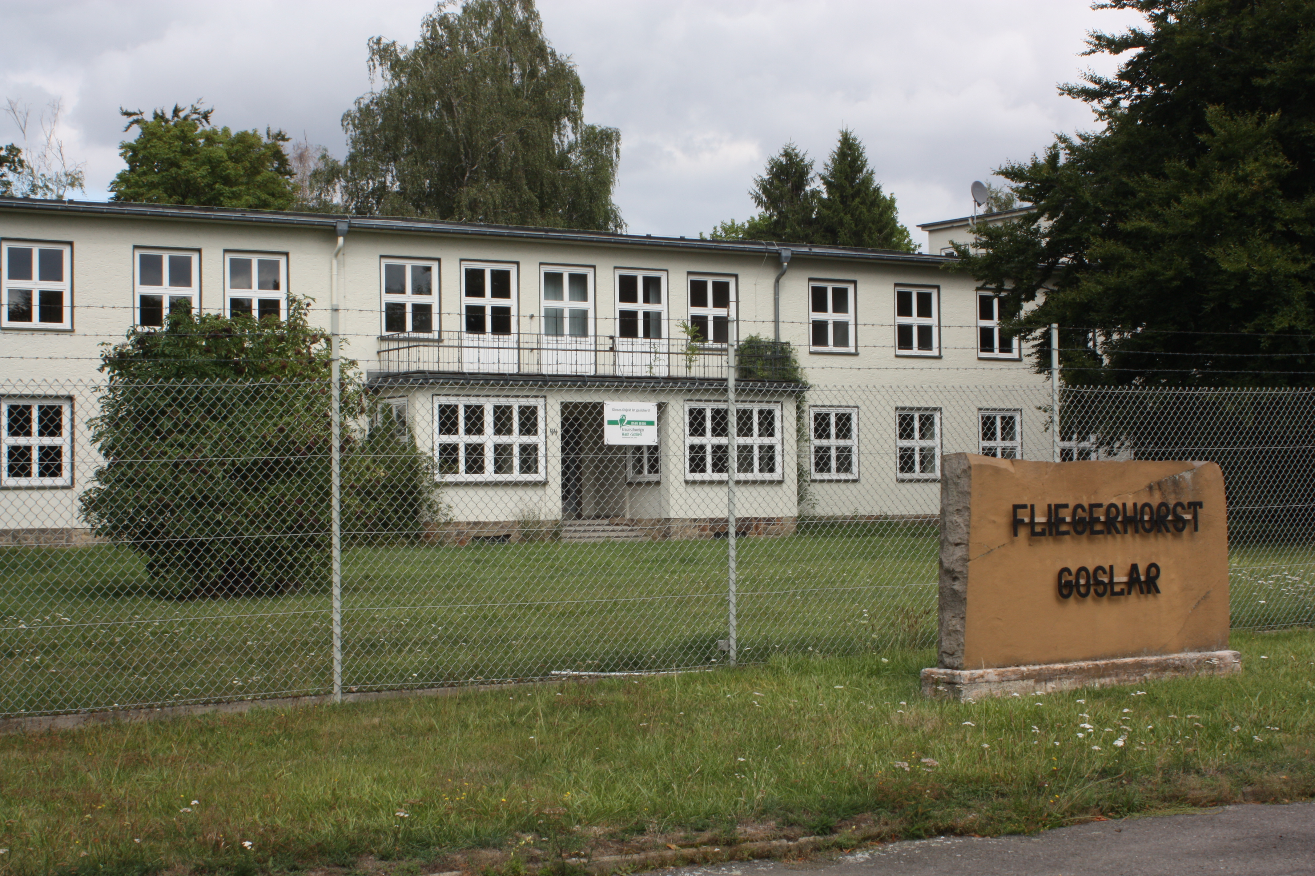 Fliegerhorst Goslar, frühere Flugleitung